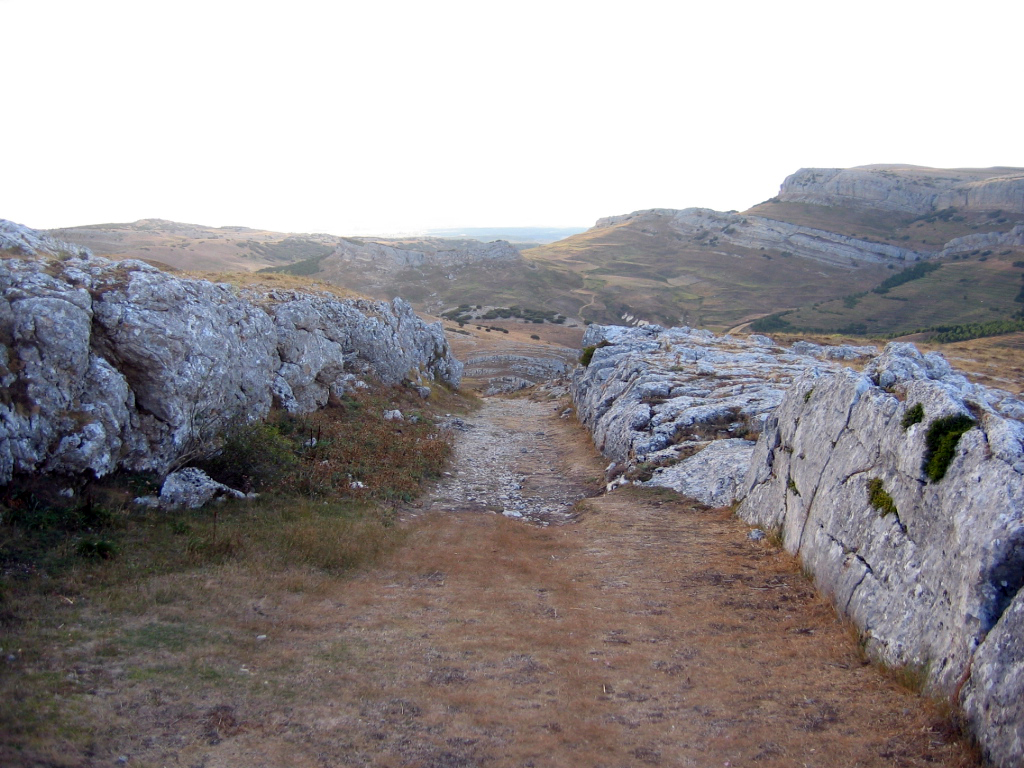 Imagen de los restos del castro de Peña Amaya, los cuales abarcan desde el siglo X a.C. hasta el siglo XIV d.C. En la imagen, trinchera excavada en la roca que servía de entrada al recinto. Situado en el extremo meridional de la Lora burgalesa, Peña Amaya se asoma como una adelantada atalaya sobre la campiña castellana. Desde la Prehistoria, las condiciones estratégicas de este favorecido enclave han atraído a muy diversos pobladores. A finales de la Edad del Bronce, en torno al s. X a.C., la presencia humana en el cerro se intensifica, convirtiéndose durante la Edad del Hierro (s. VIII-I a. C.) en uno de los principales castros cántabros, que perdura hasta el último episodio de la conquista romana de la Península (29-19 a. C.). Se funda entonces la ciudad romana de Amaia Patricia, que será tomada por el rey visigodo Leovigildo en el año 574 d. C. Tarik ben Ziyad, caudillo de la invasión árabe, arrasa esta plaza en el año 712 d. C. expulsando al dux Pedro, padre del futuro Alfonso I. Amaya queda deshabitada hasta finales del s. IX (860 d. C.) cuando el conde Rodrigo, por orden de Ordoño I, repuebla este lugar, que pronto pasa a convertirse en una de las plazas más importantes de la primera frontera de la Reconquista cristiana. La villa medieval permanecerá en el cerro, amparada por la fortaleza que se alza en el punto más alto, hasta que, probablemente en el S. XII, la población se traslade a l llanura inmediata. El castillo, como sede del poder señorial, continúa en uso al menos hasta entrado el s. XIV. De esta dilatada historia hoy podemos observar la trinchera de acceso al castro posiblemente cántabra, las ruinas del pueblo medieval, que tal vez reaprovechó estructuras más antiguas, las murallas que defendieron el castillo y, en la cima, apenas vestigios de la imponente fortaleza que señoreó Amaya.